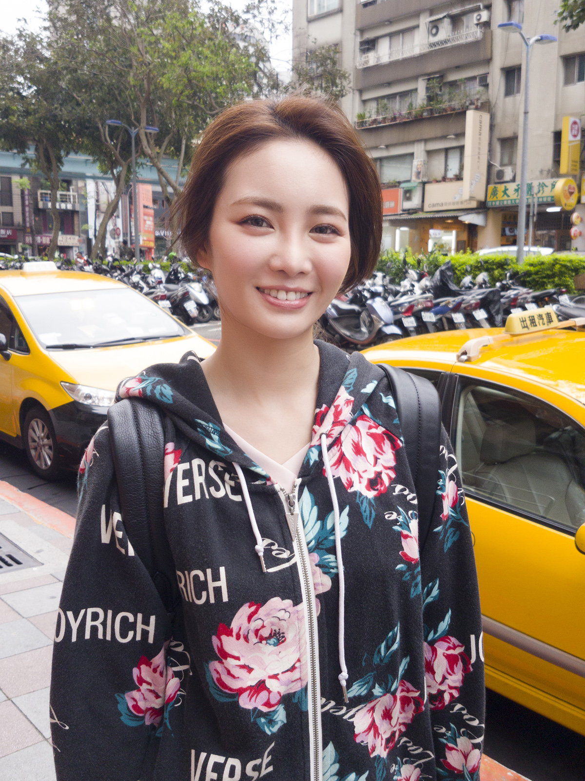 20170506 Sogo忠孝館 Swatch 一日店長活動